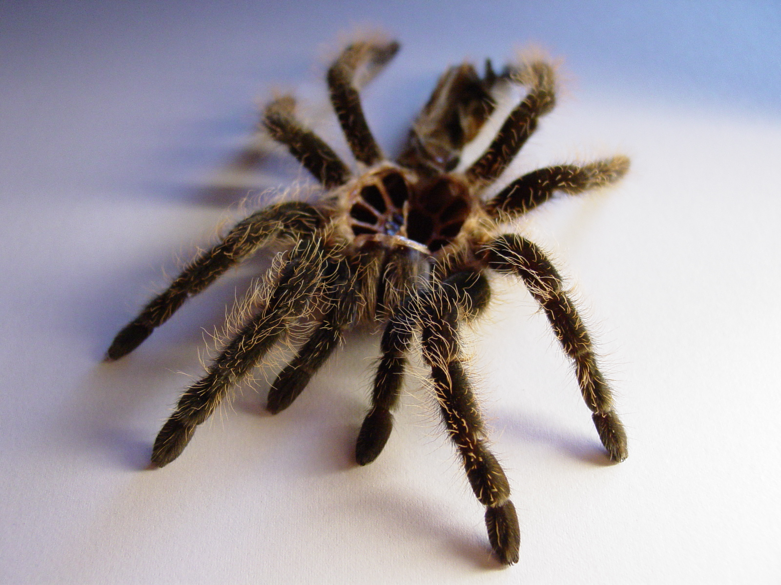 Vervellingshuid van de Brachypelma Albopilosum (Krulhaarvogelspin).